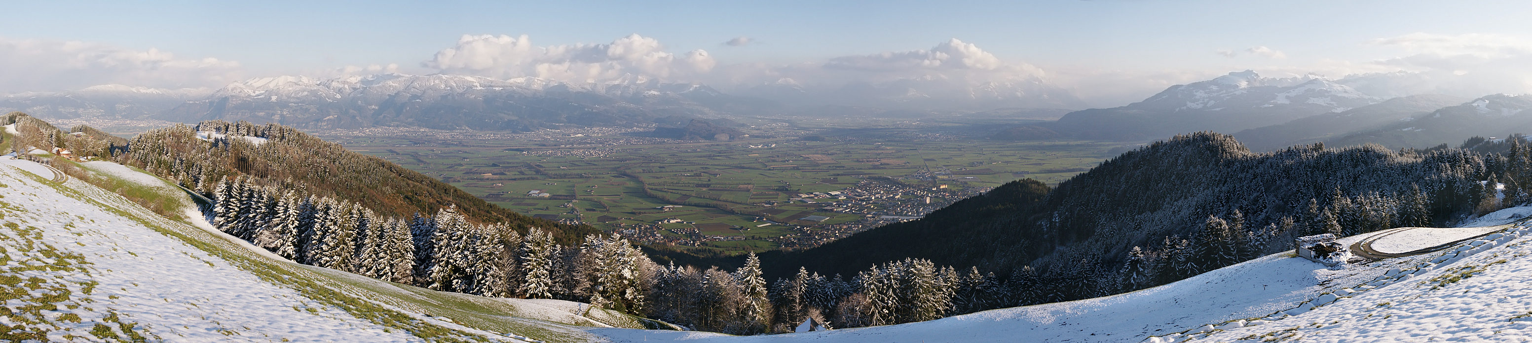 Blick vom St.Anton ins Rheintal um Altstätten Aufnahme vom 18. März 2008 17:30 Uhr Panorama besteht aus 7 Hochformataufnahmen EXIF Daten der ersten Aufnahme: 1/800 s - f/6.3 - ISO 200 - 45 mm KB Aufnahmestandort: St.Anton im Appenzell AI 1107 m – 47° 24' 39.9" / 9° 32' 32.3" (758.750/253.250) Blickrichtung: 148° - Öffnungswinkel: ca. 160°